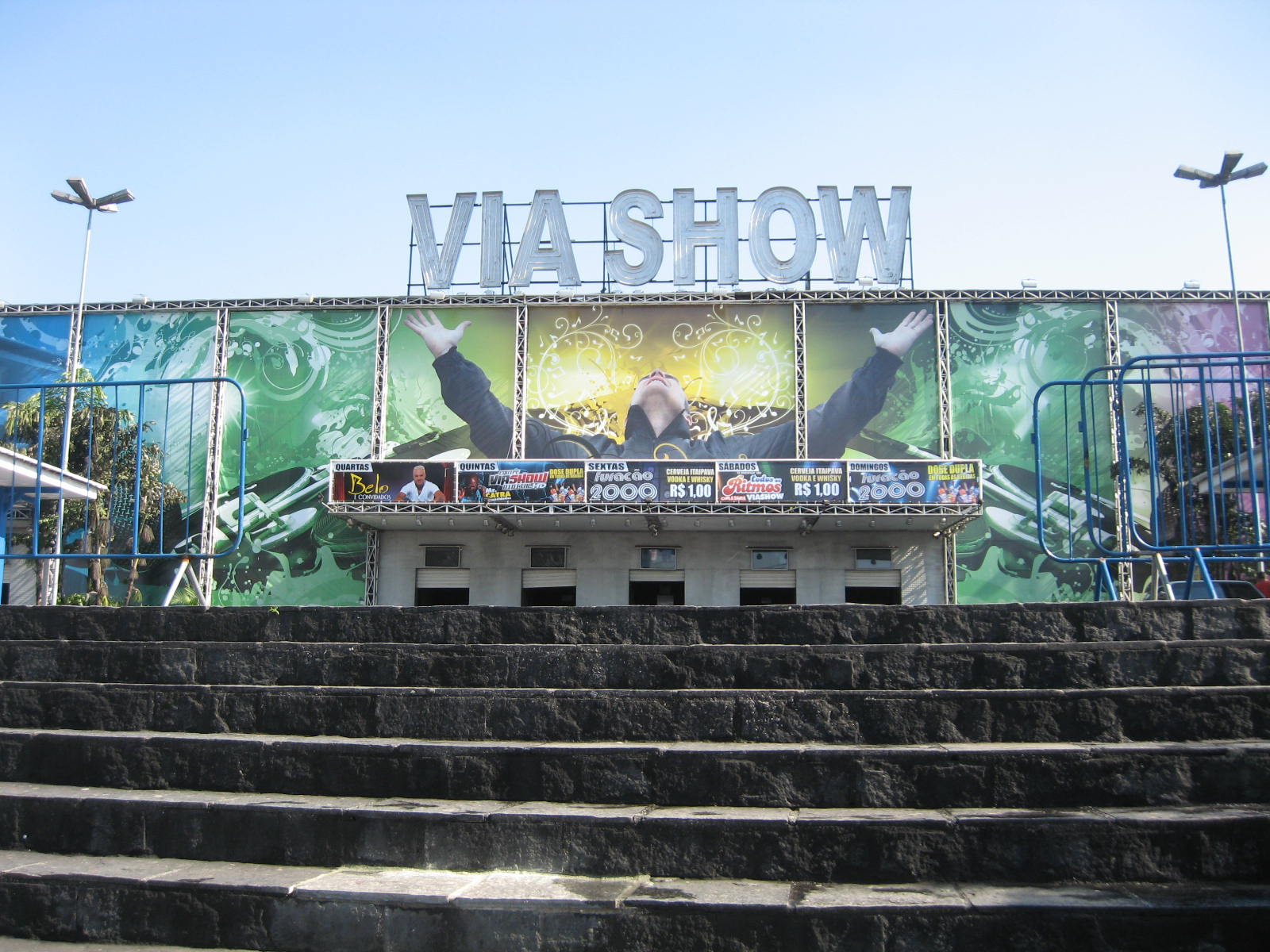 Vista da casa de espetáculos Via Show em São João de Meriti.